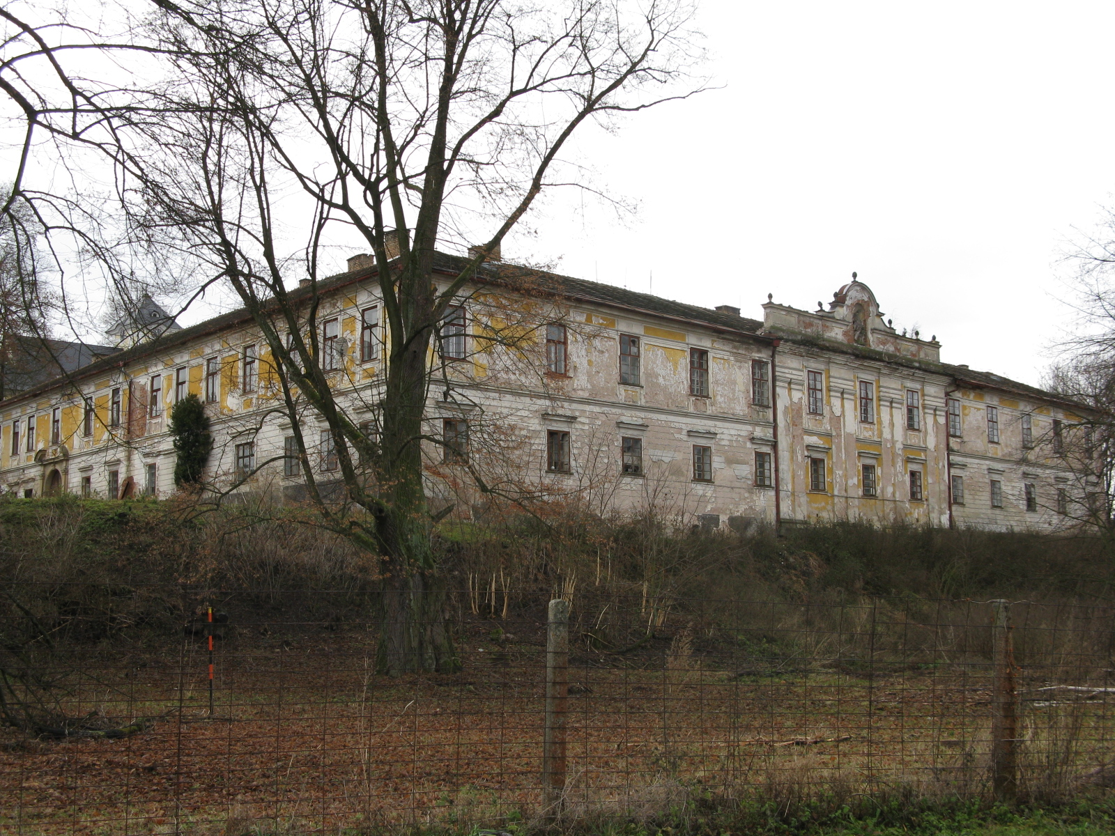 Zámek Biskupice-pohled od JV